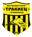 FC thrakischen 2005 (Glavinitsa) Bulgarien